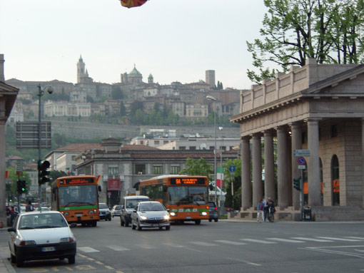 Bergamo, Porta Nuova